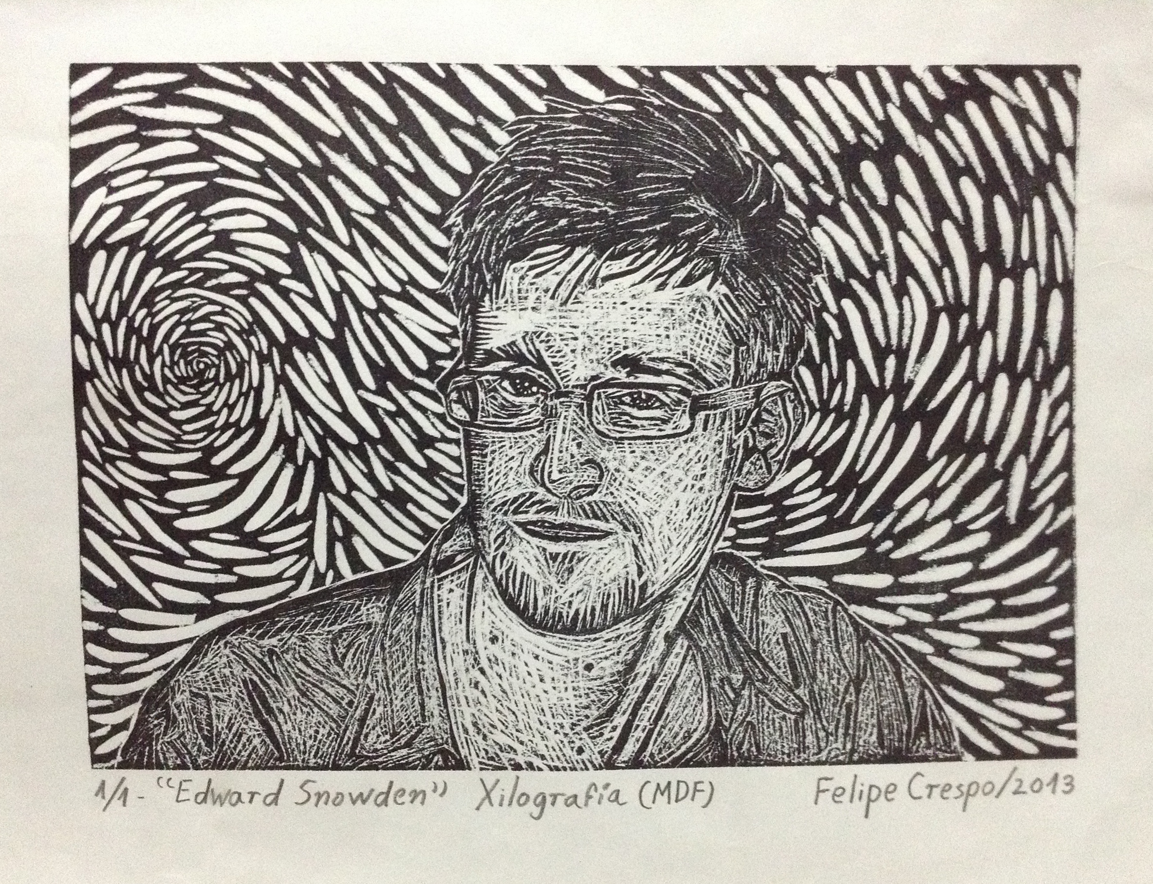 Grabado con la técnica de xilografía sobre el ex empleado de la CIA, Edward Snowden.